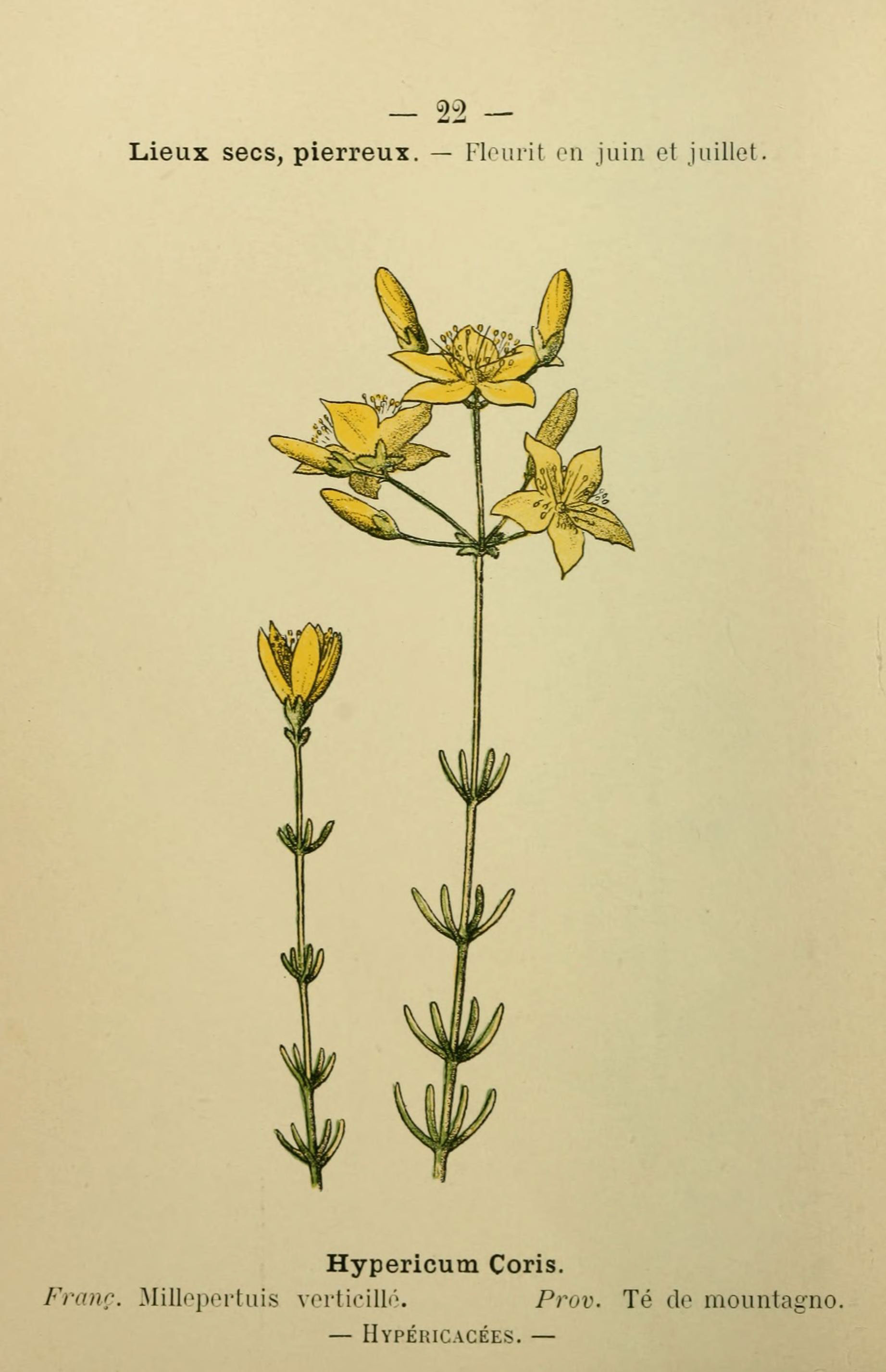 — 22 — Lieux secs, pierreux. — Floiirit eu juin et juillet Hypericum Coris. Fntnr. 3Iillq)ertuis vertieilir'. Prov. Té do mountagno. — Hypéricacées. —